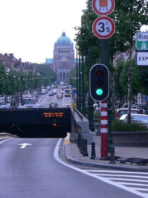 Moi E.Poulsen, auteur de cette photo cède tous les droits au profit de la fondation Wikimedia et Wikipedia, tous les droits sont libres